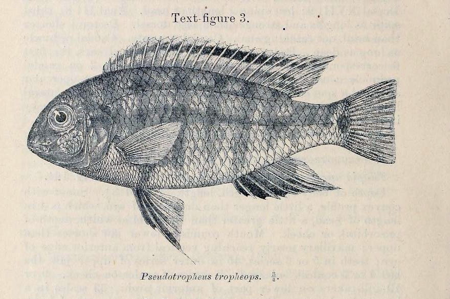 Tropheops tropheops